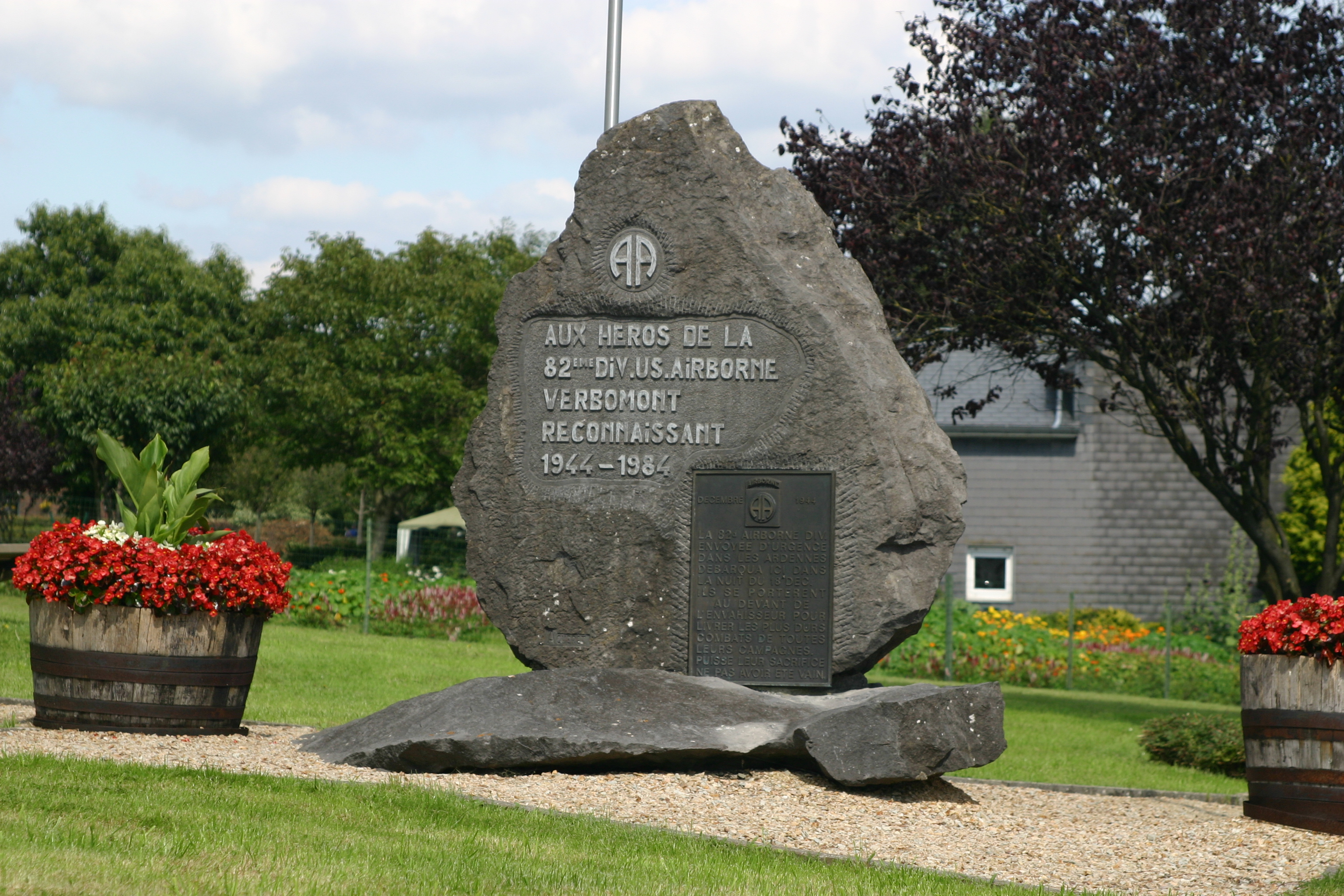 Monument fir 82th U.S. Airborne division